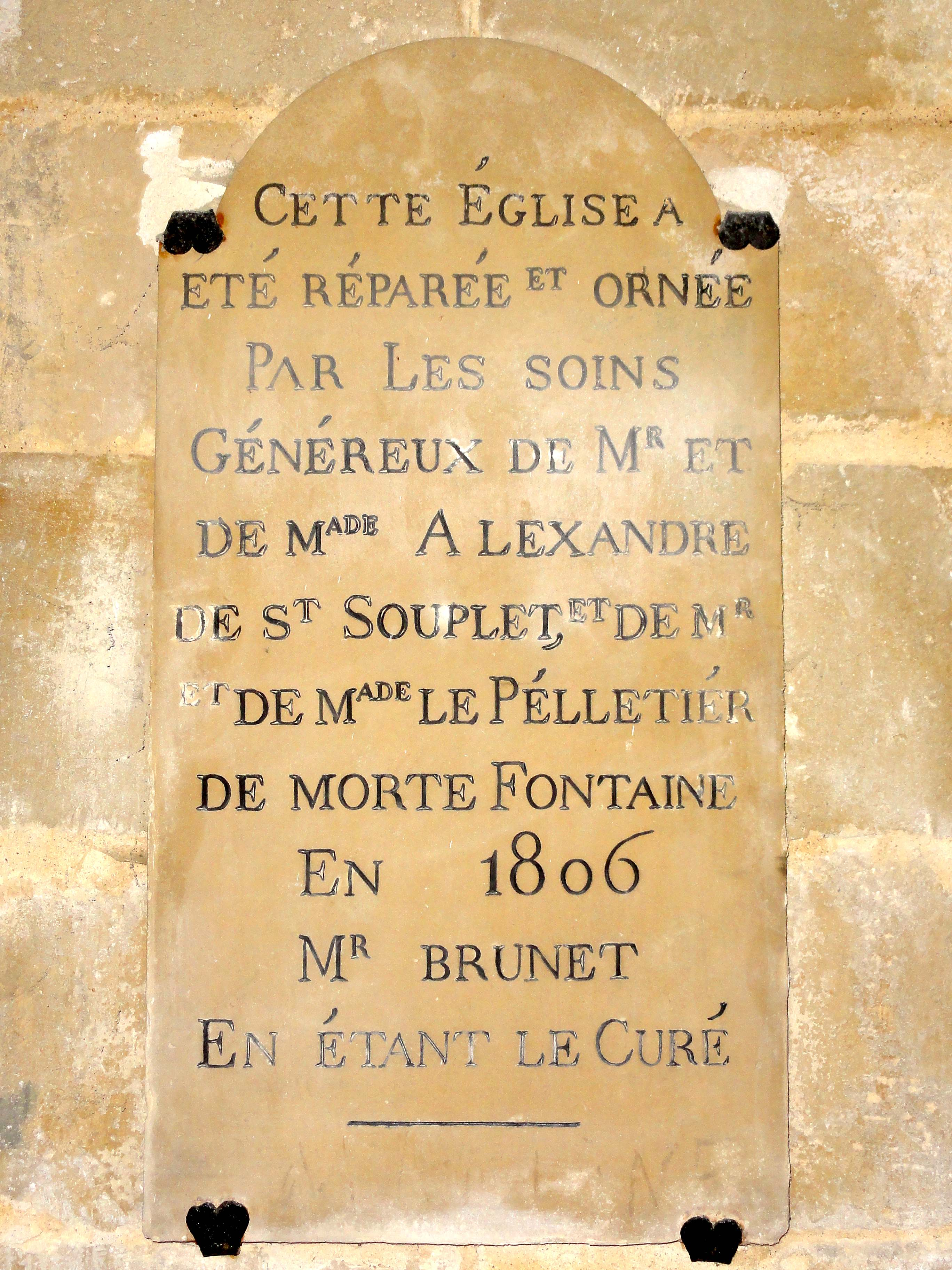 Base du clocher, plaque commémorative de la restauration de l'église en 1806.